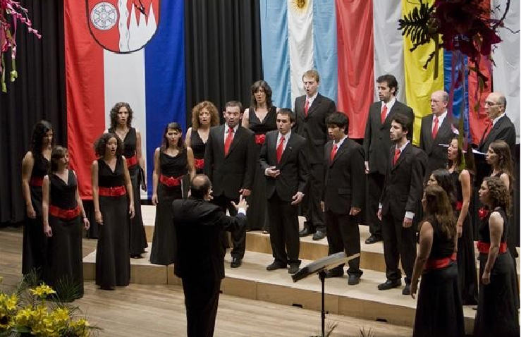 El Coro de la Facultad de Filosofía y Letras de la Uniersidad de Buenos Aires durane su actuación el el 8vo Certamen Internacional de Coros de Elsenfeld, Alemania. Donde obtuvo un diploma de Bronce.